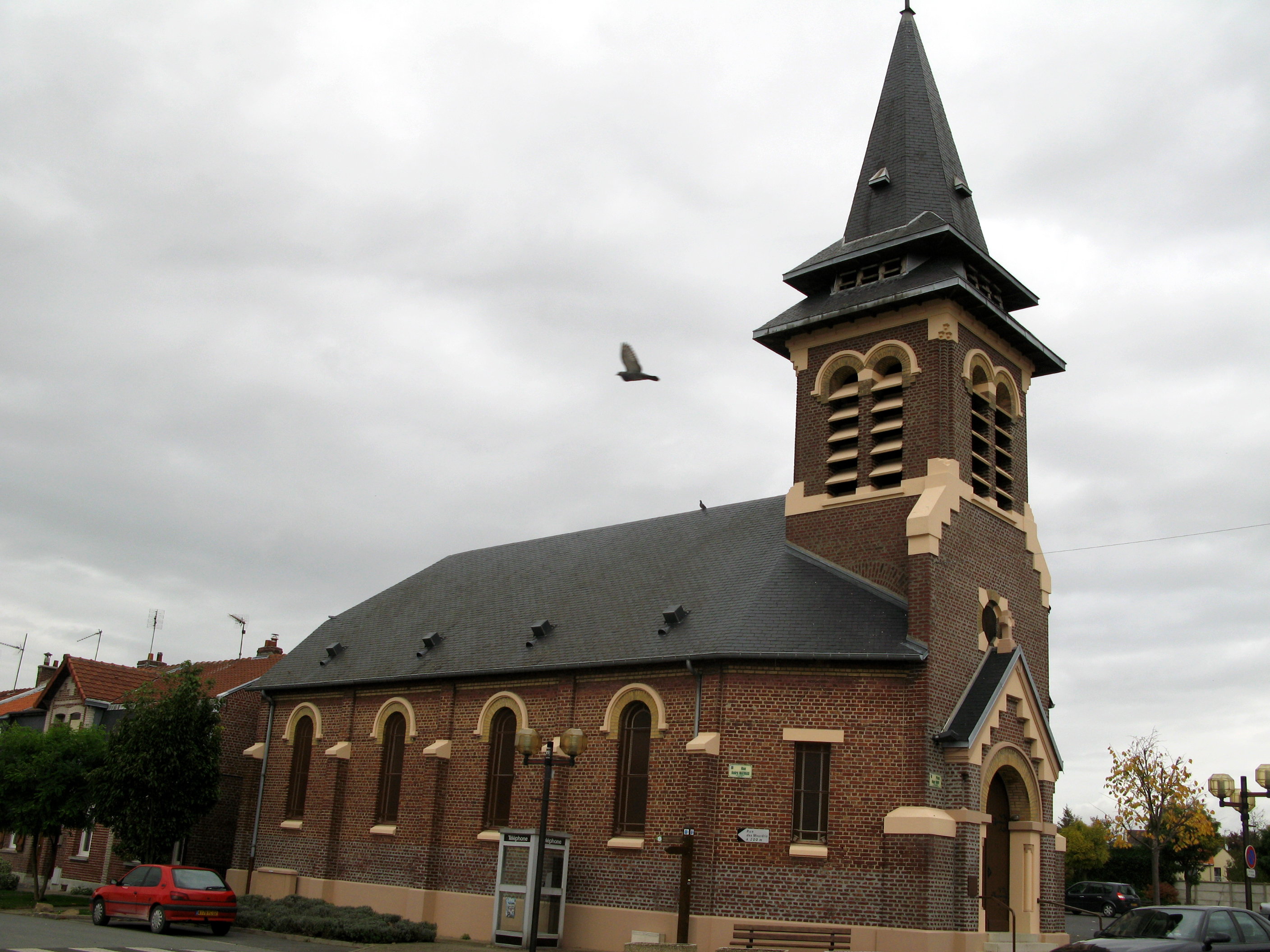 Morcourt (Aisne, France) - L'église. . .